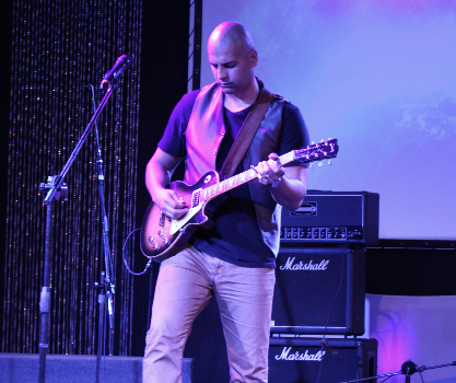 Richie Dalmau tocando en vivo